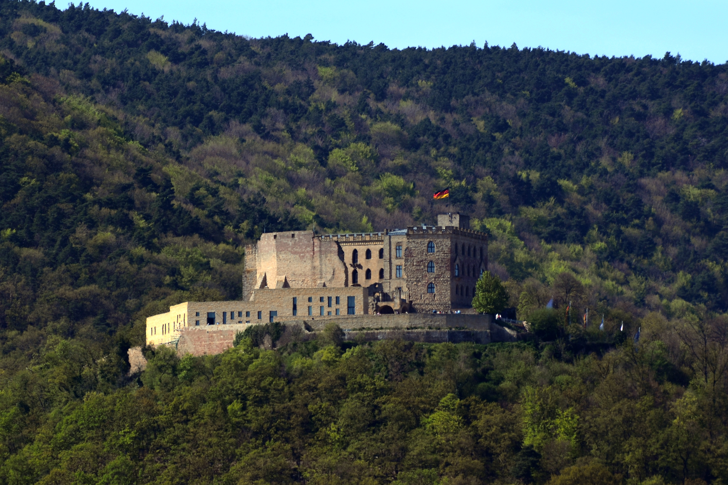 Hambacher Schloss